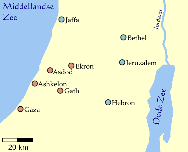 Philistinian pentapolis.